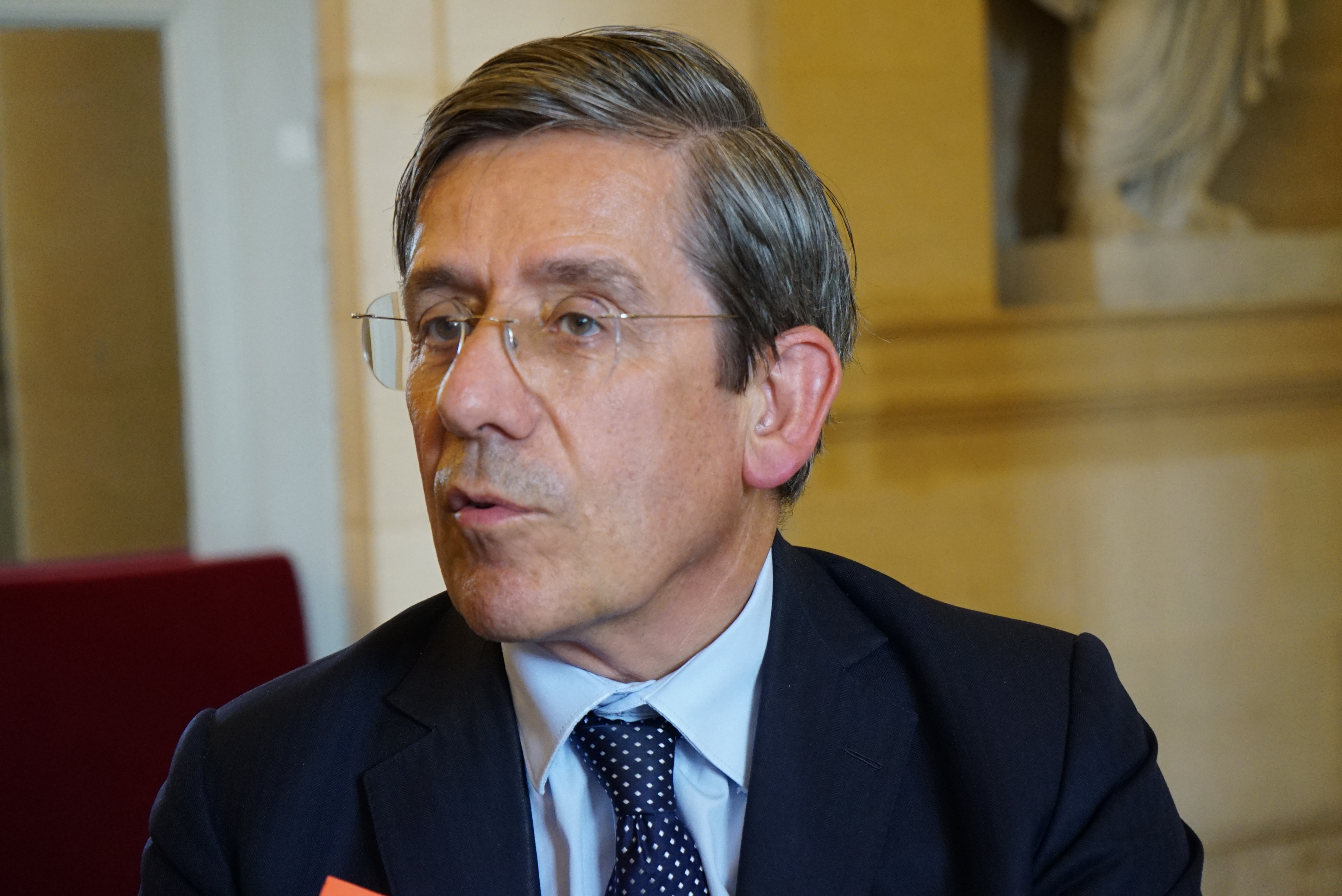 le député au Palais BOurbon.